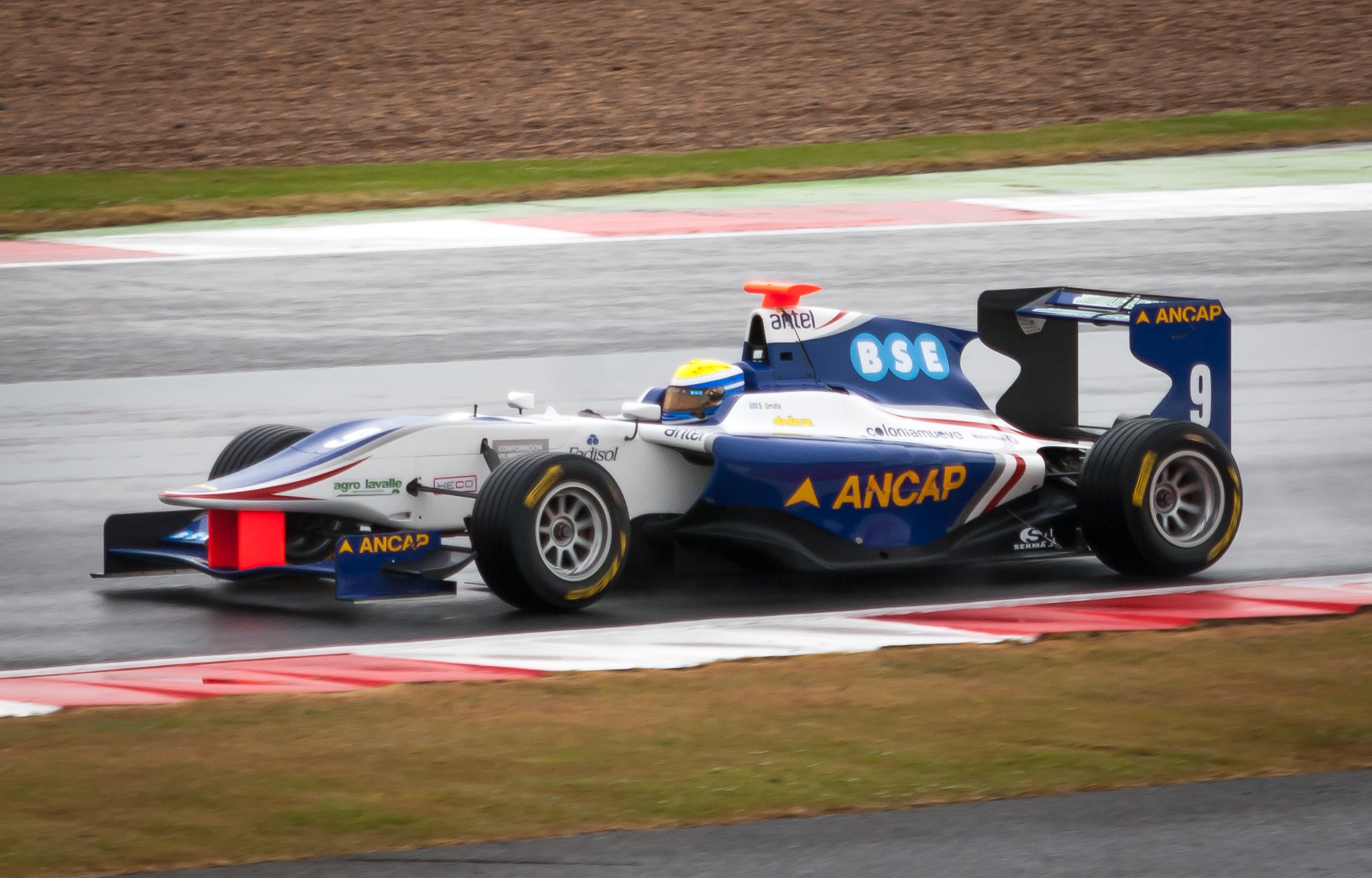 Santiago Urrutia en la GP3 2014 con Koiranen GP.